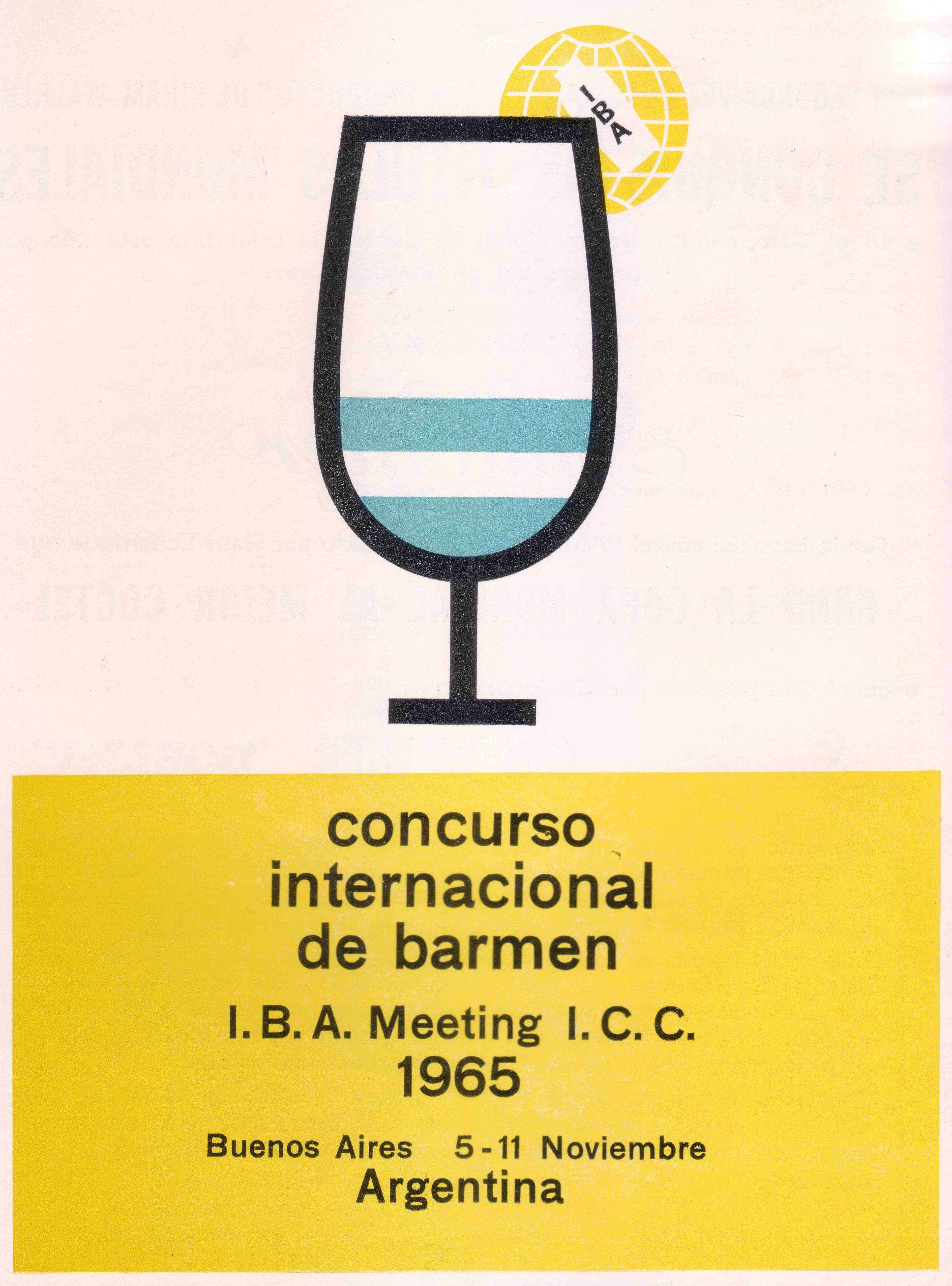 Logotipo_ICC_Buenos_Aires_1965